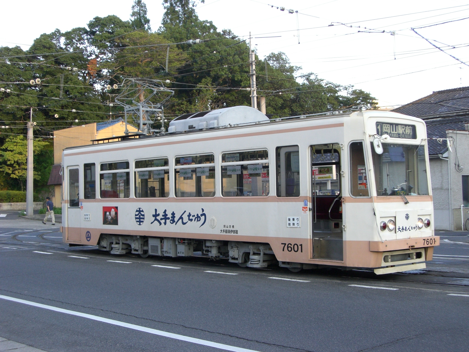 岡山電軌7601形